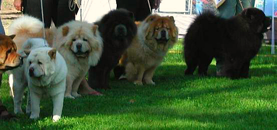 Beskriver några svenska chowchow - taget på chowspecialen i Morokulien aug-06. Jag (Annica Engström) har själv tagit fotot.